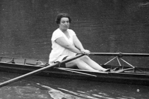 Portrait d'Alice Milliat, sportive française.